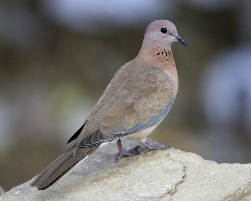 Laughing Dove Streptopelia senegalensis 5th. January 2009 Jhalana Dungri , Jaipur, India Distribution: 690V8245